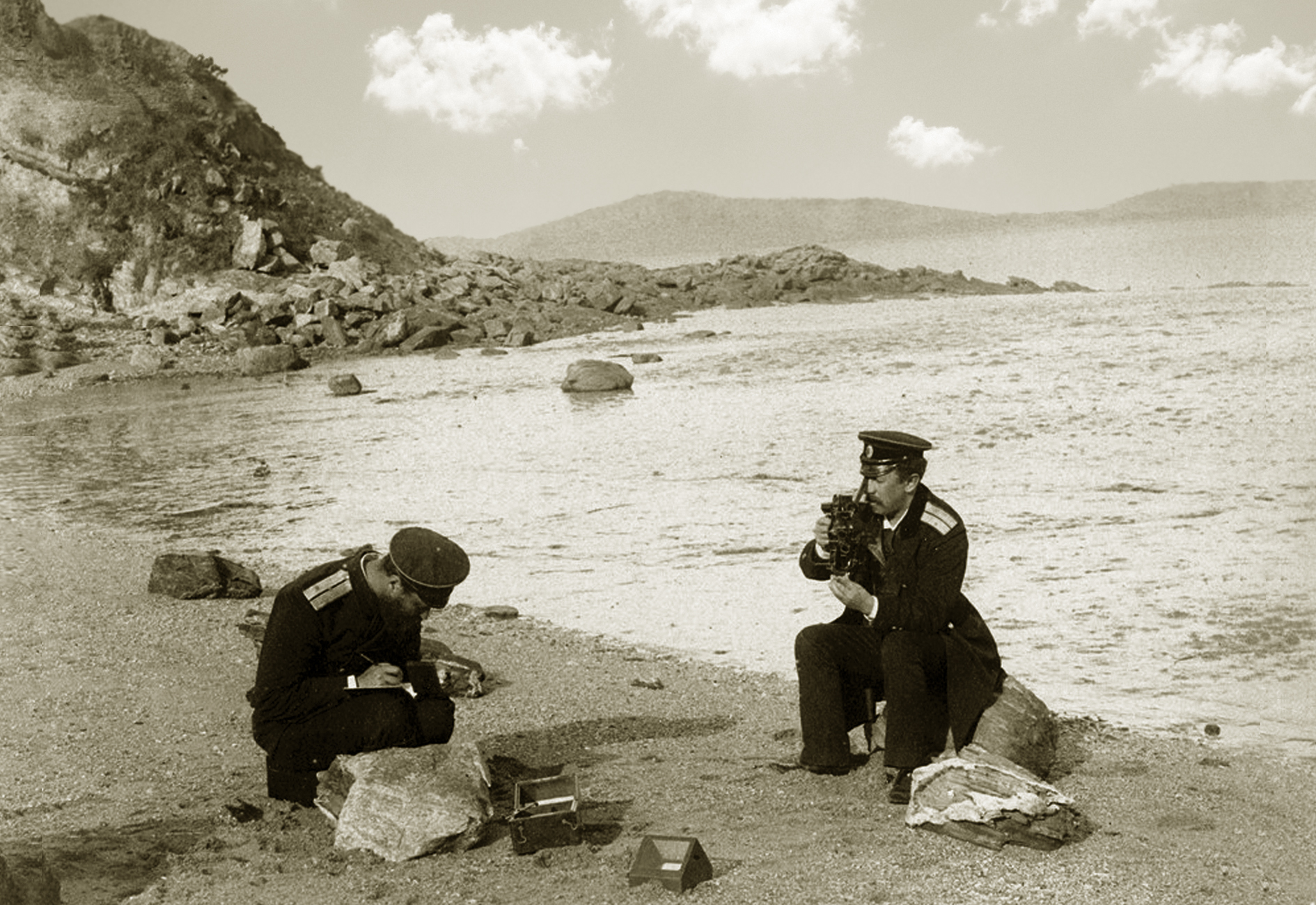 Офицеры Витязя ведут научные наблюдения